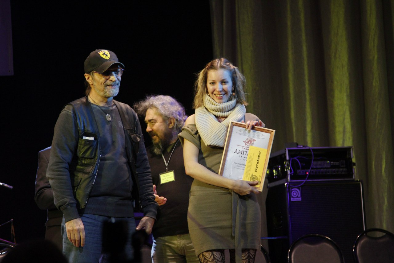 группа «Декарт Рене», г. Пущино Московская обл. — лауреат I степени